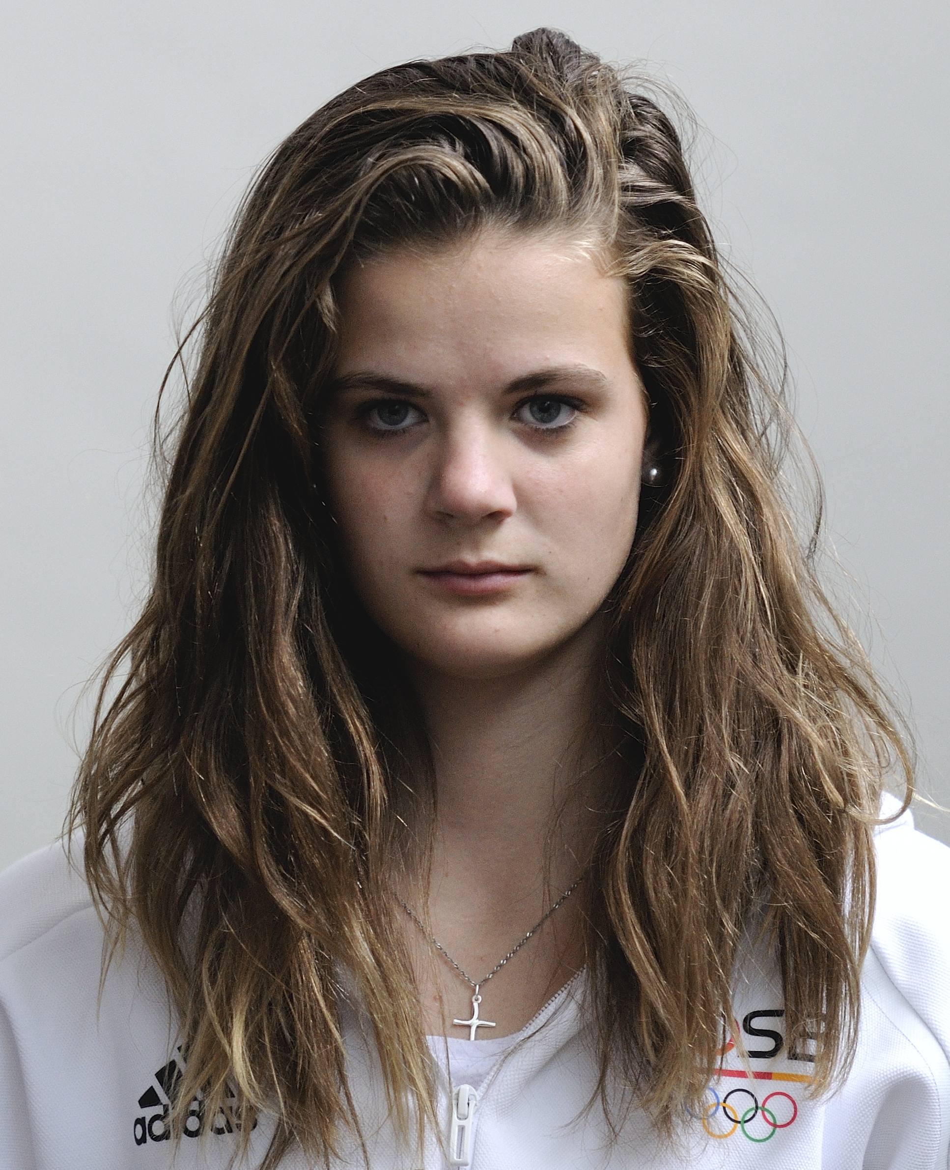 Bild aufgenommen in Hannover während der Einkleidung der deutschen Olympiamannschaft 2016. Elena Wassen.